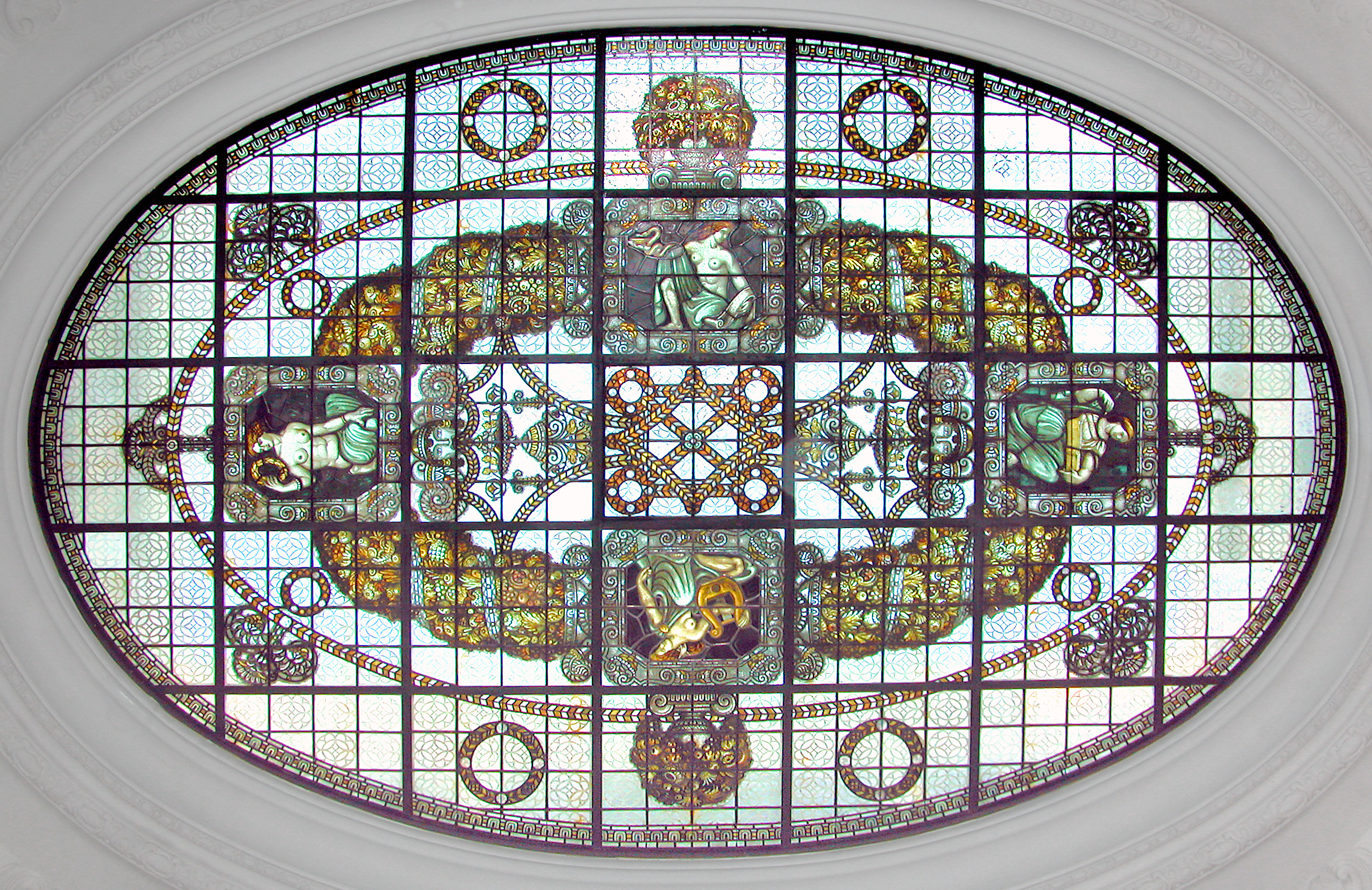 16.10.2007 08396 Waldenburg, Peniger Str. 10: Schloß, Mittelalterlicher Fürstensitz. Heutiger Bau von 1912. Oberlichtfenster der Bibliothek. [DSCN30737]20071016210DR.JPG(c)Blobelt